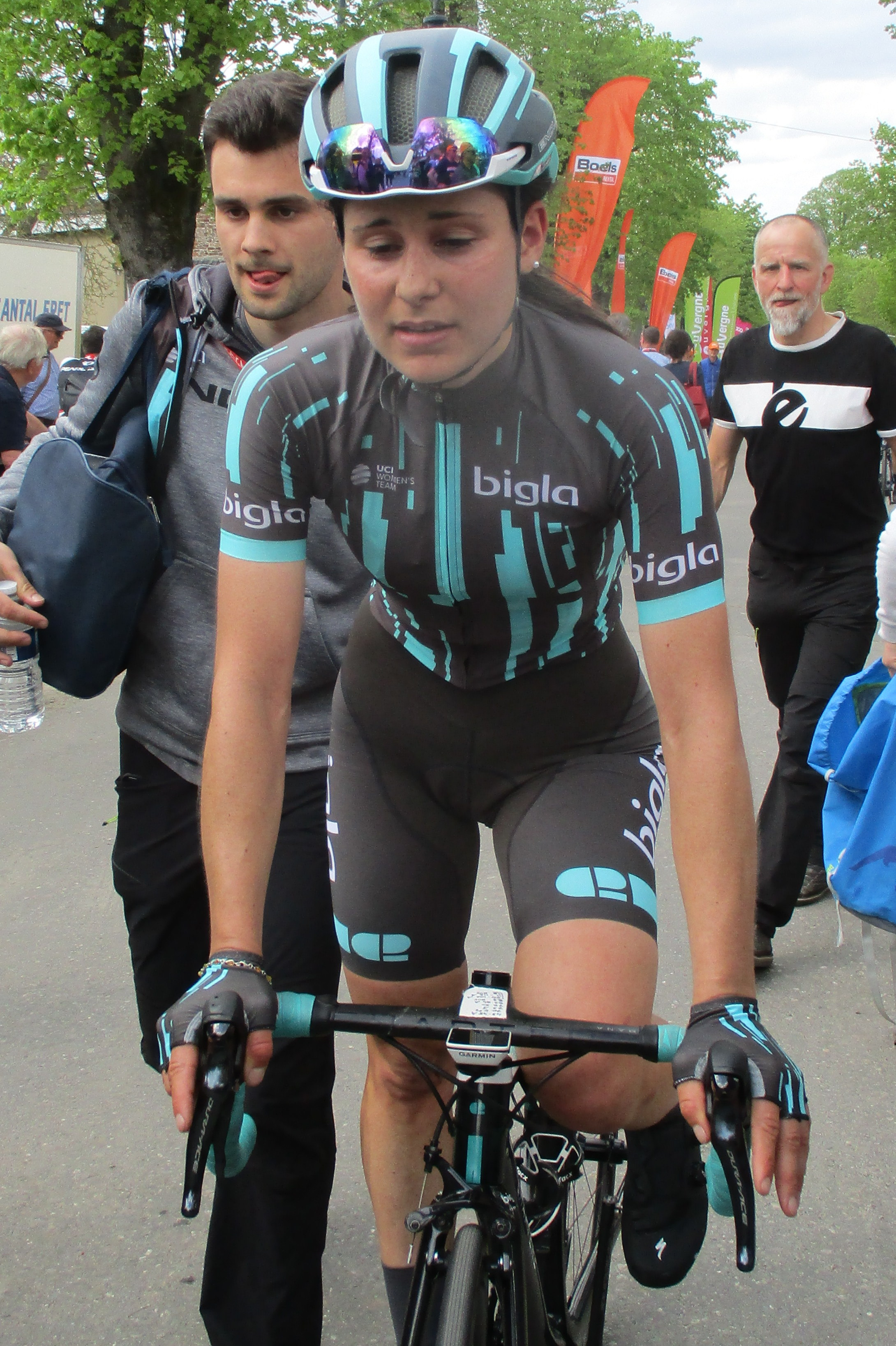 Finish van de Waalse Pijl 2019 voor vrouwen op de Mur de Huy